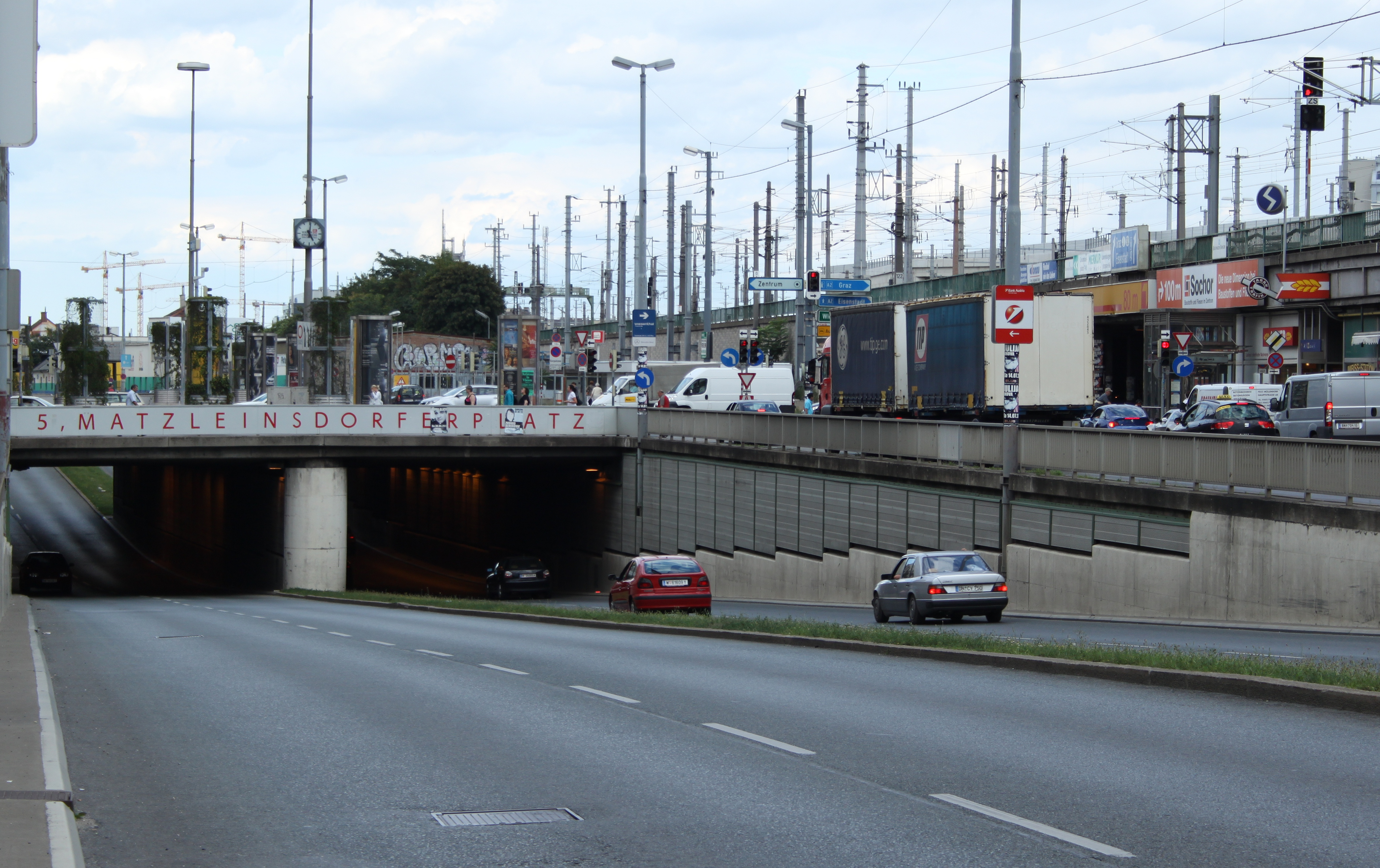 tuneleto sub la placo Matzleinsdorfer Platz en Vieno, Viena Zono